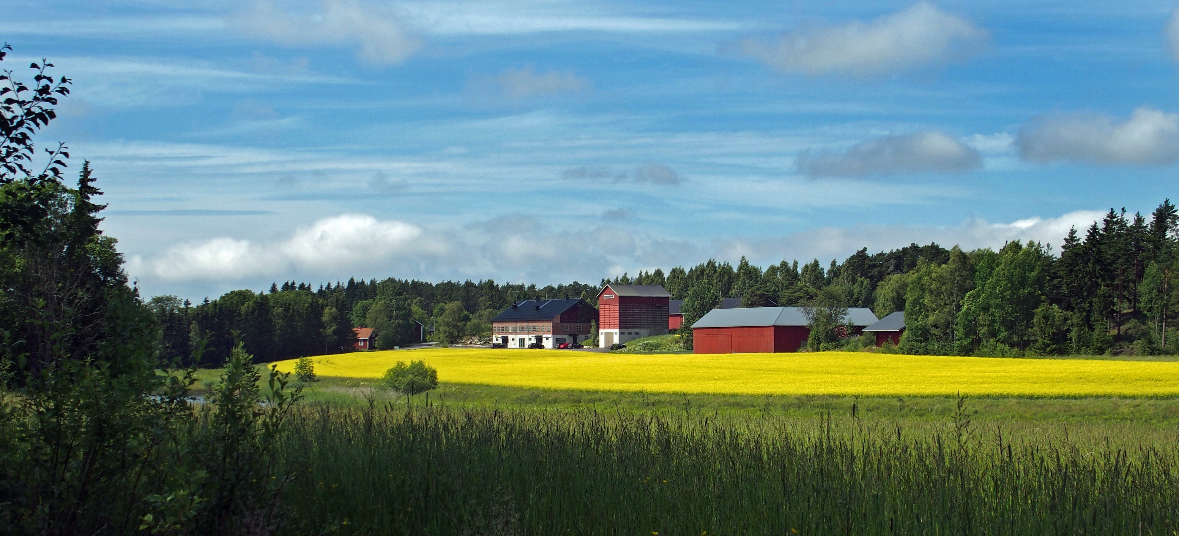 Hintsan kartanon talousrakennuksia Raisionjoen toiselta puolen kuvattuna